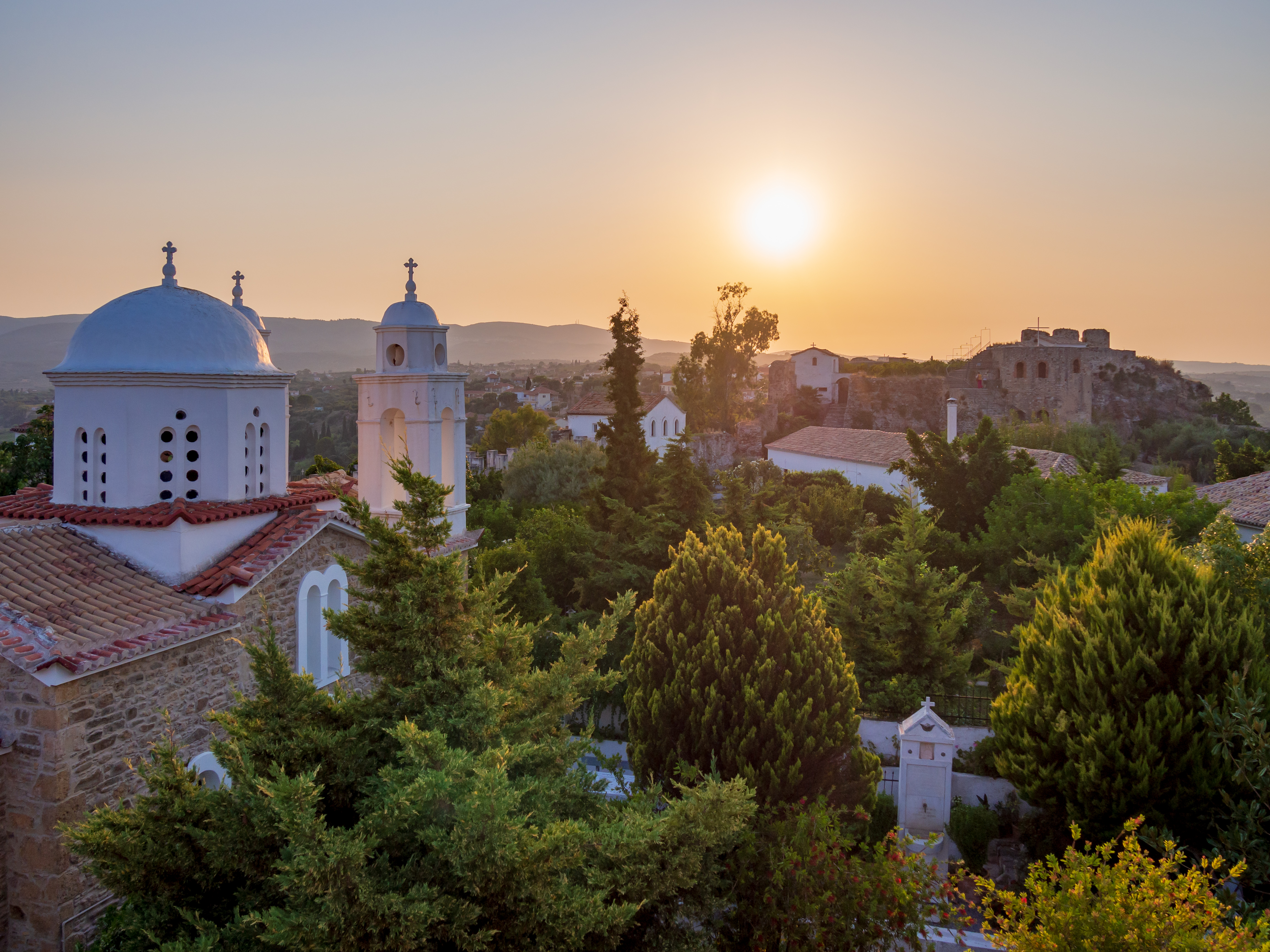 Κάστρο Κορώνης - η μονή Τιμίου Προδρόμου, εντός του κάστρου«Κάστρο Κορώνης»